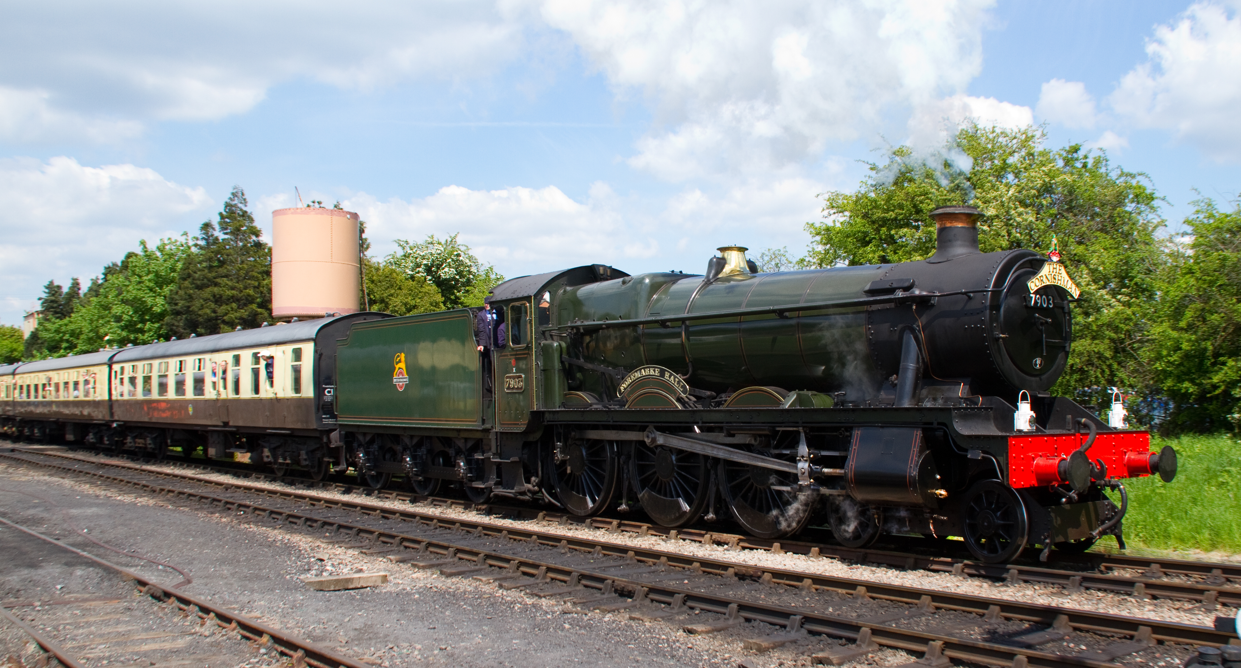 Foremarke Hall Leaving Toddington